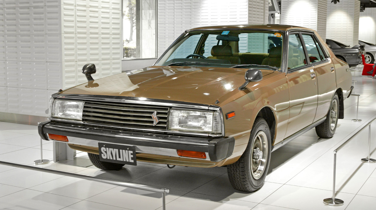 Nissan Skyline C211 4-door Sedan 2000 GT-EL